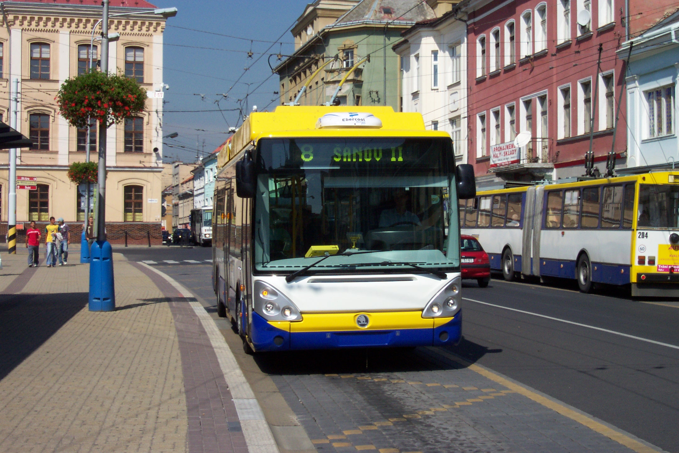 Teplice, Czech republic, trolleybus type 24Tr at Benešovo náměstí - Trolejbus typu 24Tr v Teplicích na Benešově náměstí